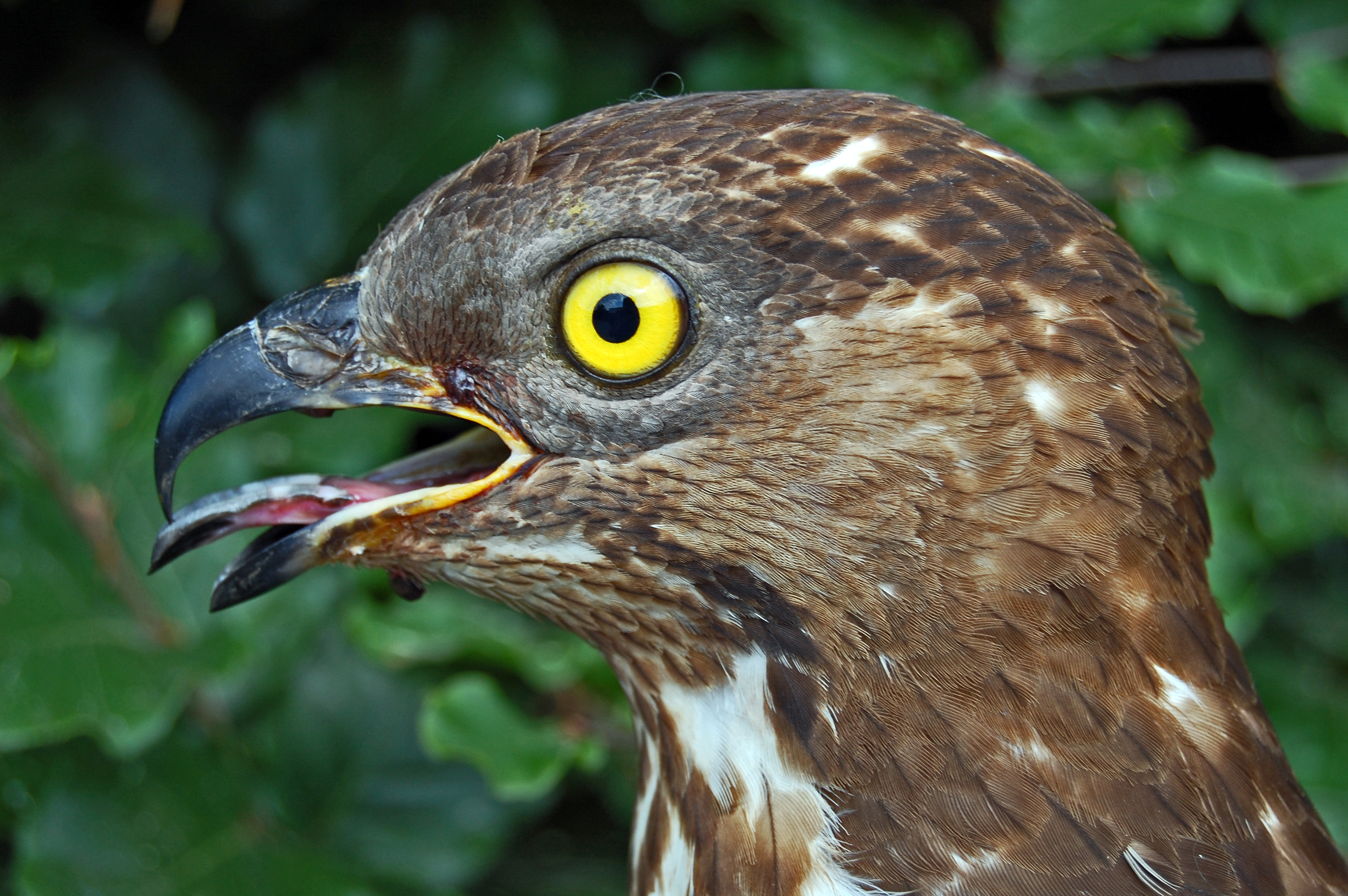 Pernis apivorus, ad. female